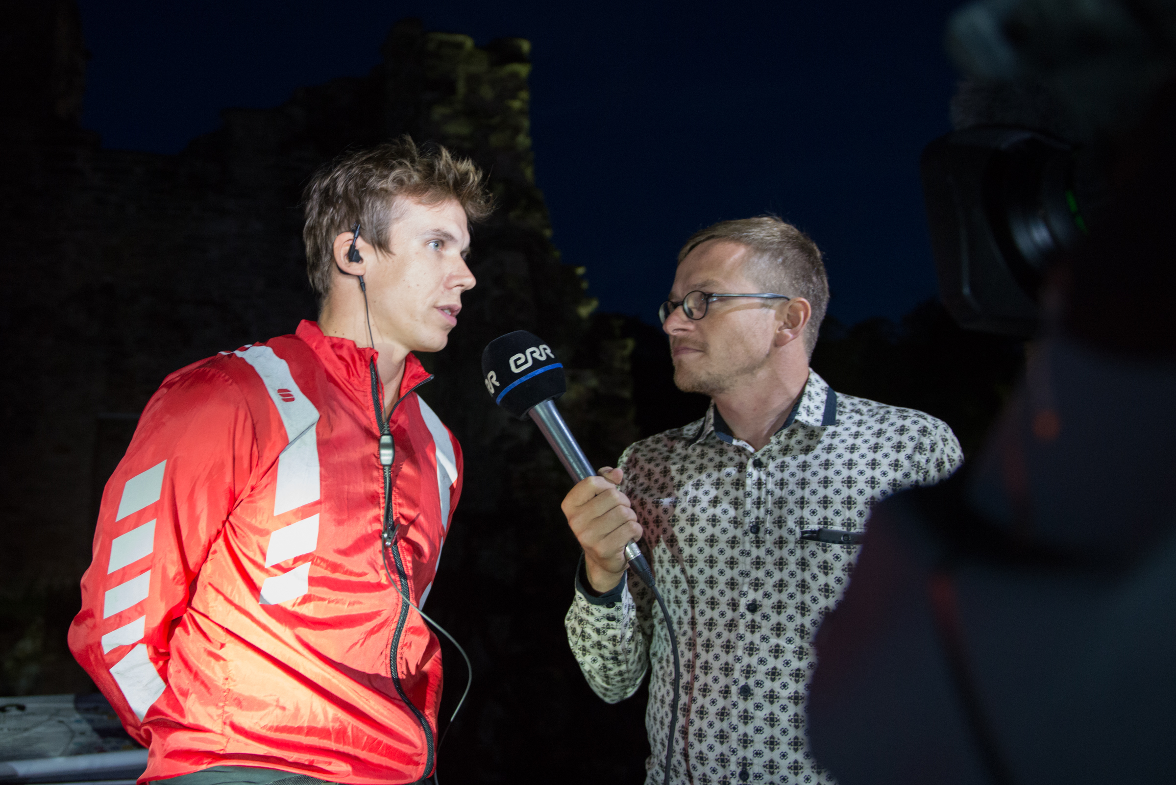 Rasmus Kaljujärv ja Jüri Muttika